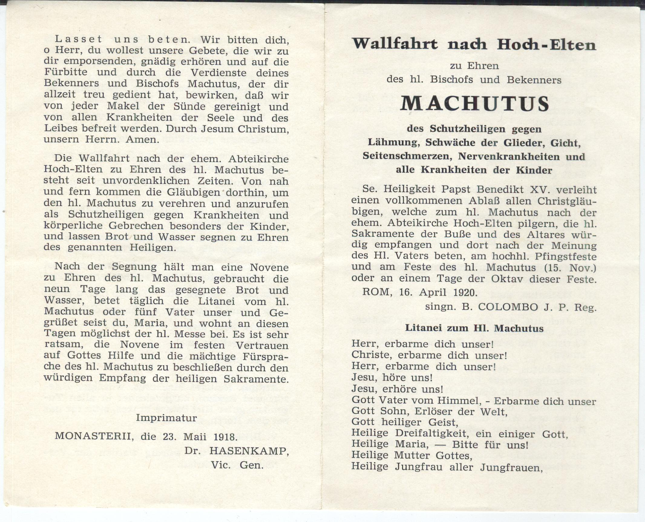 Ein Gebetszettel für die Wallfahrt zum Hl. Machutus in St. Vitus, Hoch-Elten (Emmerich), eingescannt